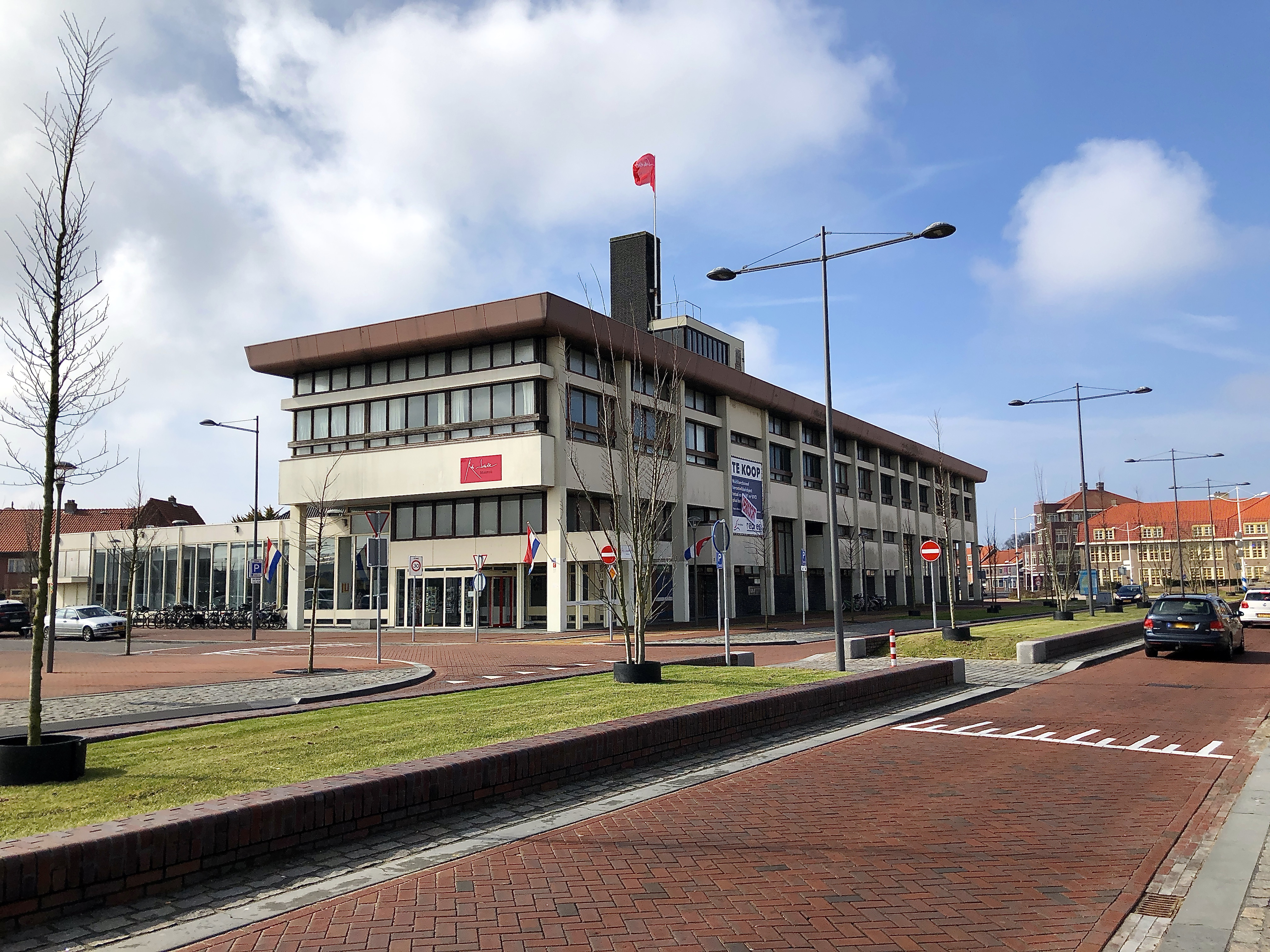 Na jaren van juridisch gesteggel is de gemeente Den Helder op 17 april 2018 begonnen met de ontruiming van het privémuseum annex woonhuis van kunstenaar Rob Scholte en zijn gezin. Het gebouw -een voormalig postkantoor van de architect Jo Kruger uit 1965- wordt gesloopt t.b.v. appartementen. Wellicht mede omdat een sluiting van het museum al enige tijd boven de markt hing, zijn de kunstwerken, die van de hand van heel veel verschillende kunstenaars zijn, nooit gelabeld, alles hing door elkaar waardoor het museum in mijn ogen nogal rommelig oogde.